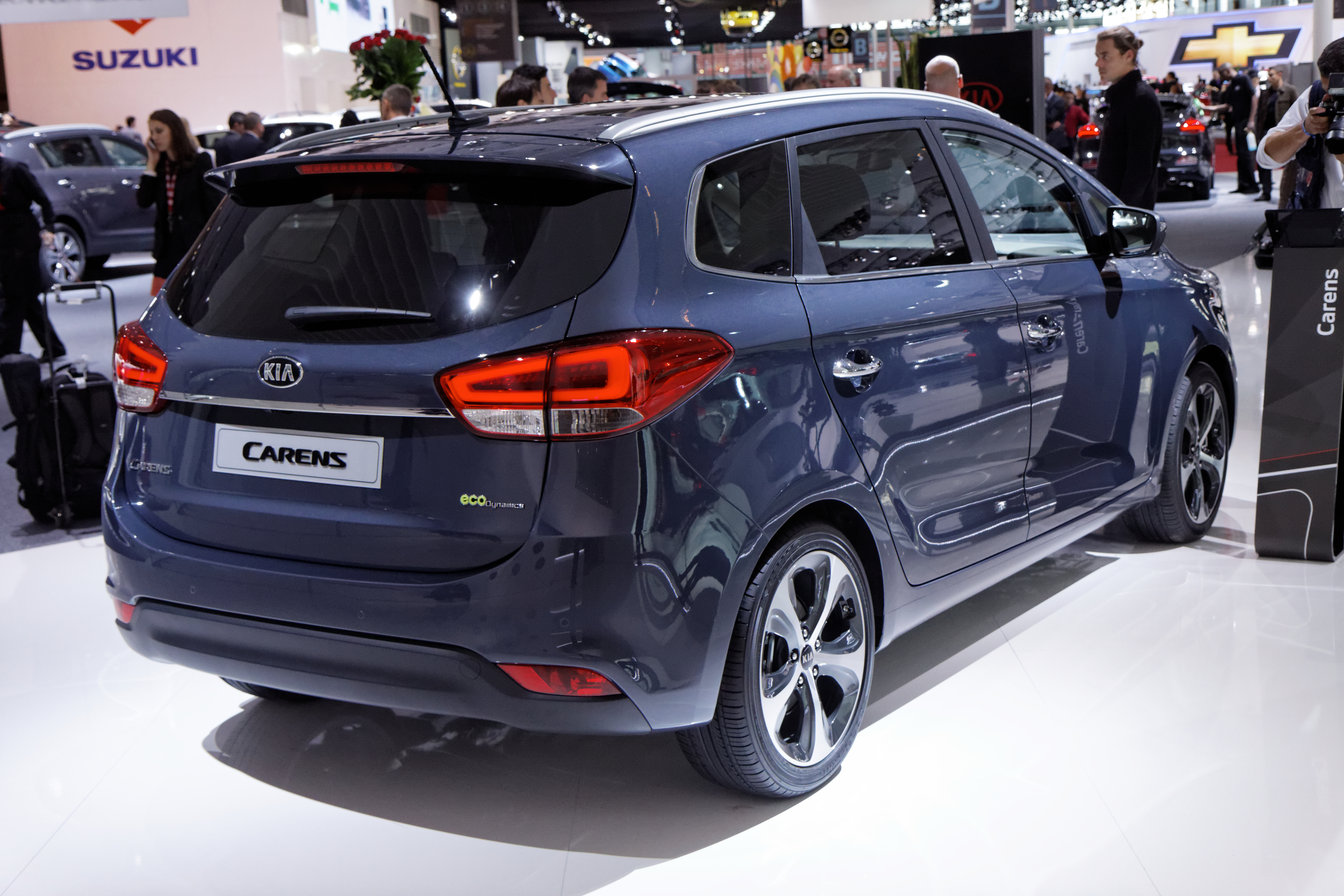 Une Kia Carens présentée lors du Mondial de l'Automobile de Paris 2012.